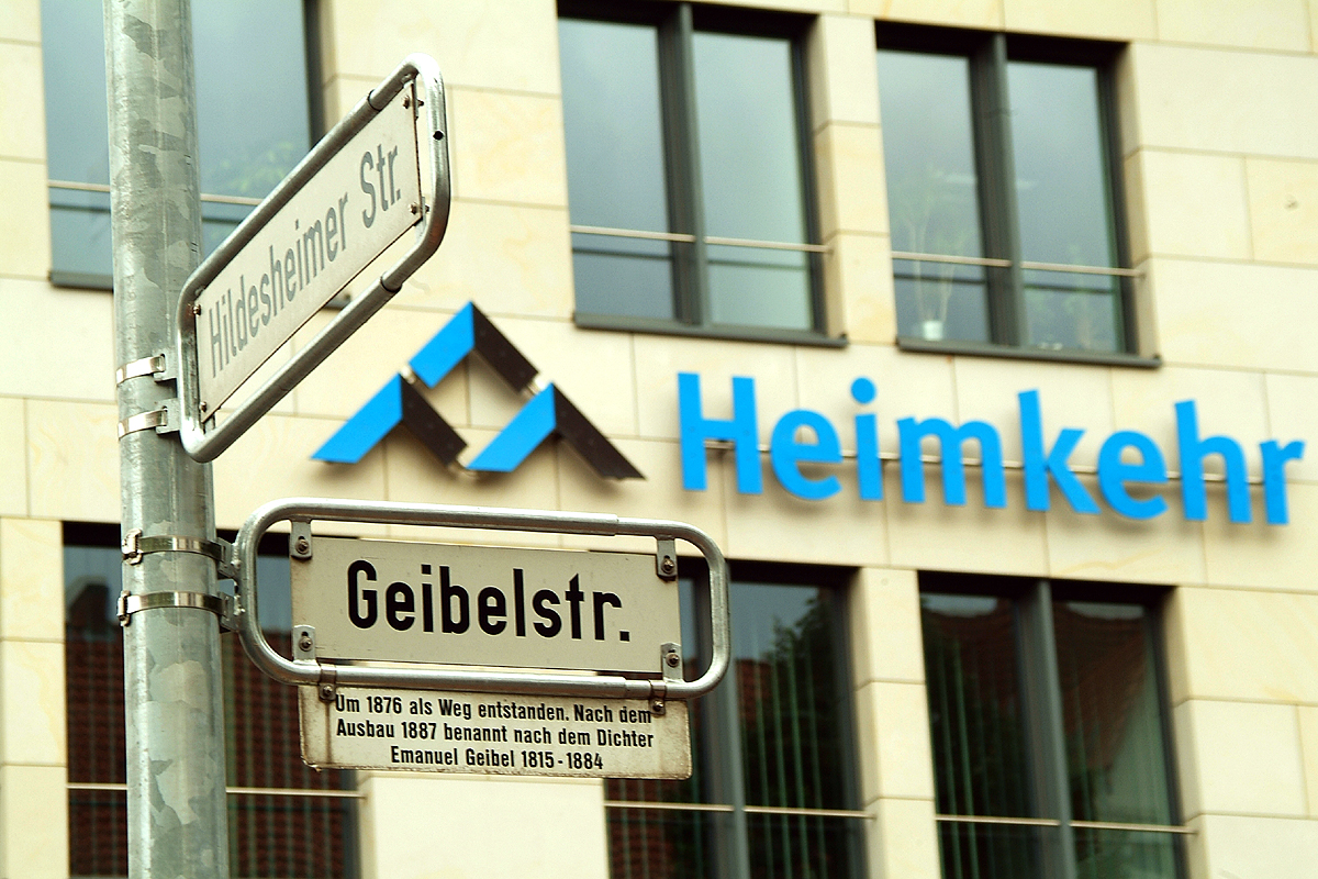 Vor dem Hauptsitz der Wohnungsgenossenschaft Heimkehr eG an der Hildesheimer Straße in Hannover gibt die gesondert angebrachte Legendentafel offizielle Daten zur Entstehung der Geibelstraße im Stadtteil Südstadt: "Um 1876 als Weg entstanden. Nach dem Ausbau 1887 benannt nach dem Dichter Emanuel Geibel 1815 - 1884" ...